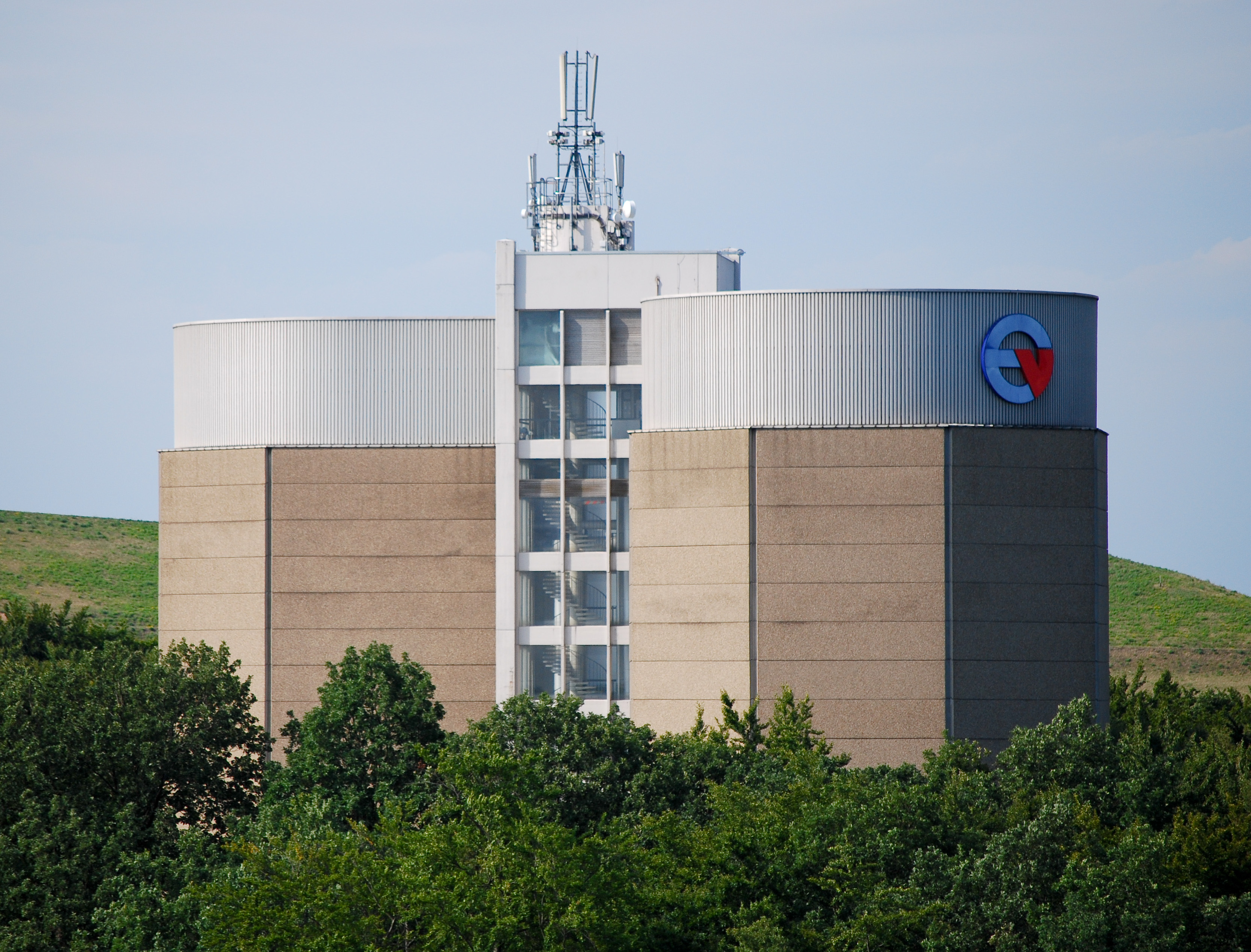 Der Wasserhochbehälter der Energieversorgung Offenbach (EVO). Es ist ein 40 Meter hoher Doppelturm, der 2 x 7.500 Kubikmeter Wasser speichern kann. Neben der Wasserspeicherung soll er durch seinen Standort auf dem Bieberer Berg für natürlichen Druck im Leitungssystem der EVO sorgen.